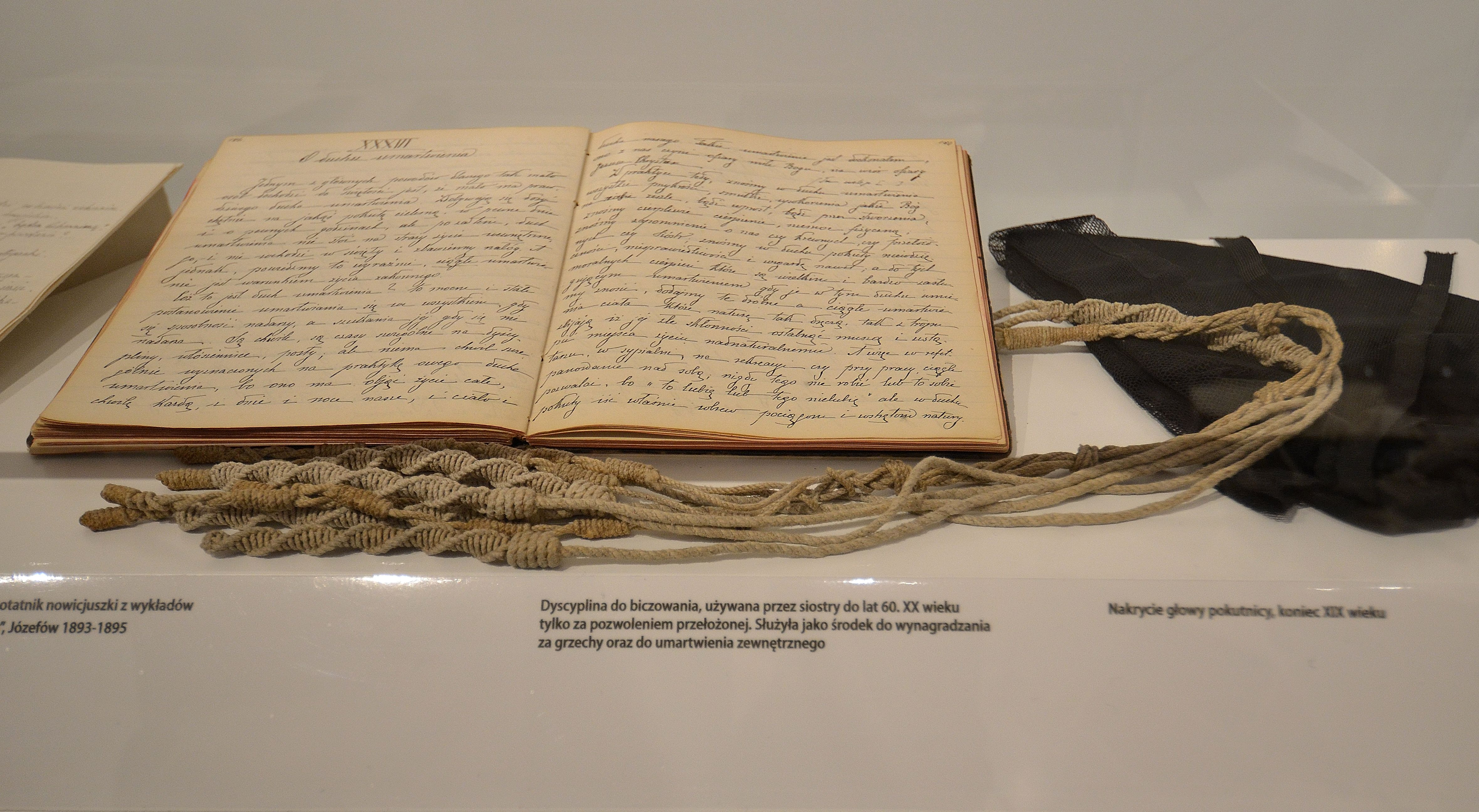 Dycyplina do biczowania w Muzeum Zgromadzenia Matki Bożej Miłosierdzia przy ul. Żytniej 3/5 w Warszawie